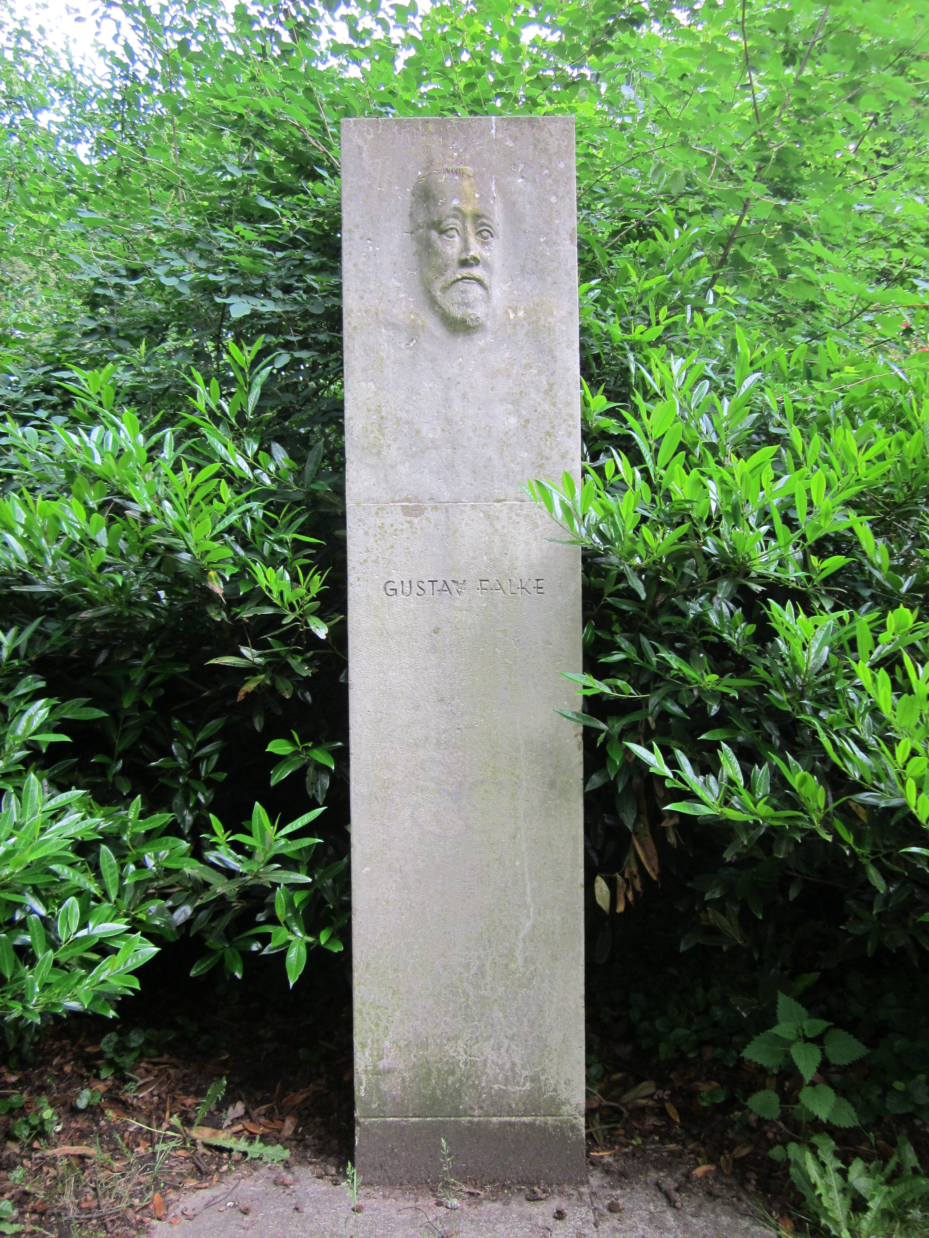 Denkmal für Gustav Falke im Herbstschen Park in Hamburg-Groß Borstel.This is a photograph of an architectural monument.